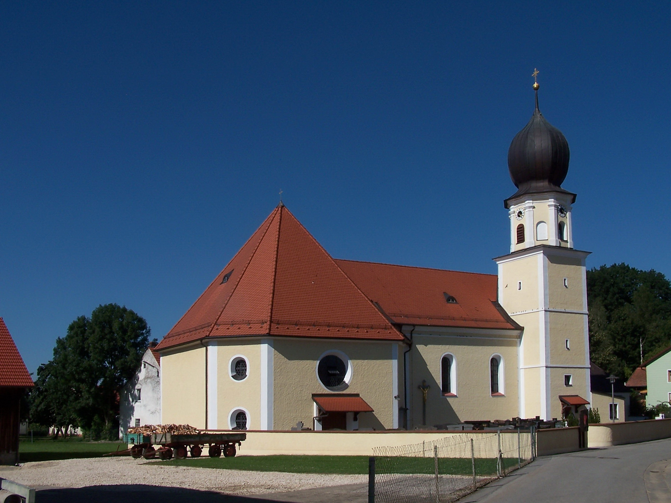 Allkofen Kirche St. Michael. Turmuntergeschoss mittelalterlich, Langhaus 1762, verlängert 1935; mit Ausstattung.